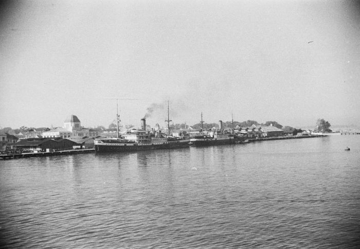 negatief. Gefotografeerd tijdens een reis van Batavia (Jakarta) naar Makassar (Ujung Pandang), 20-24 mei 1948, waarbij ook de havens van Semarang en Soerabaja (Surabaya) werden aangedaan.. Gezicht op de haven van Makassar